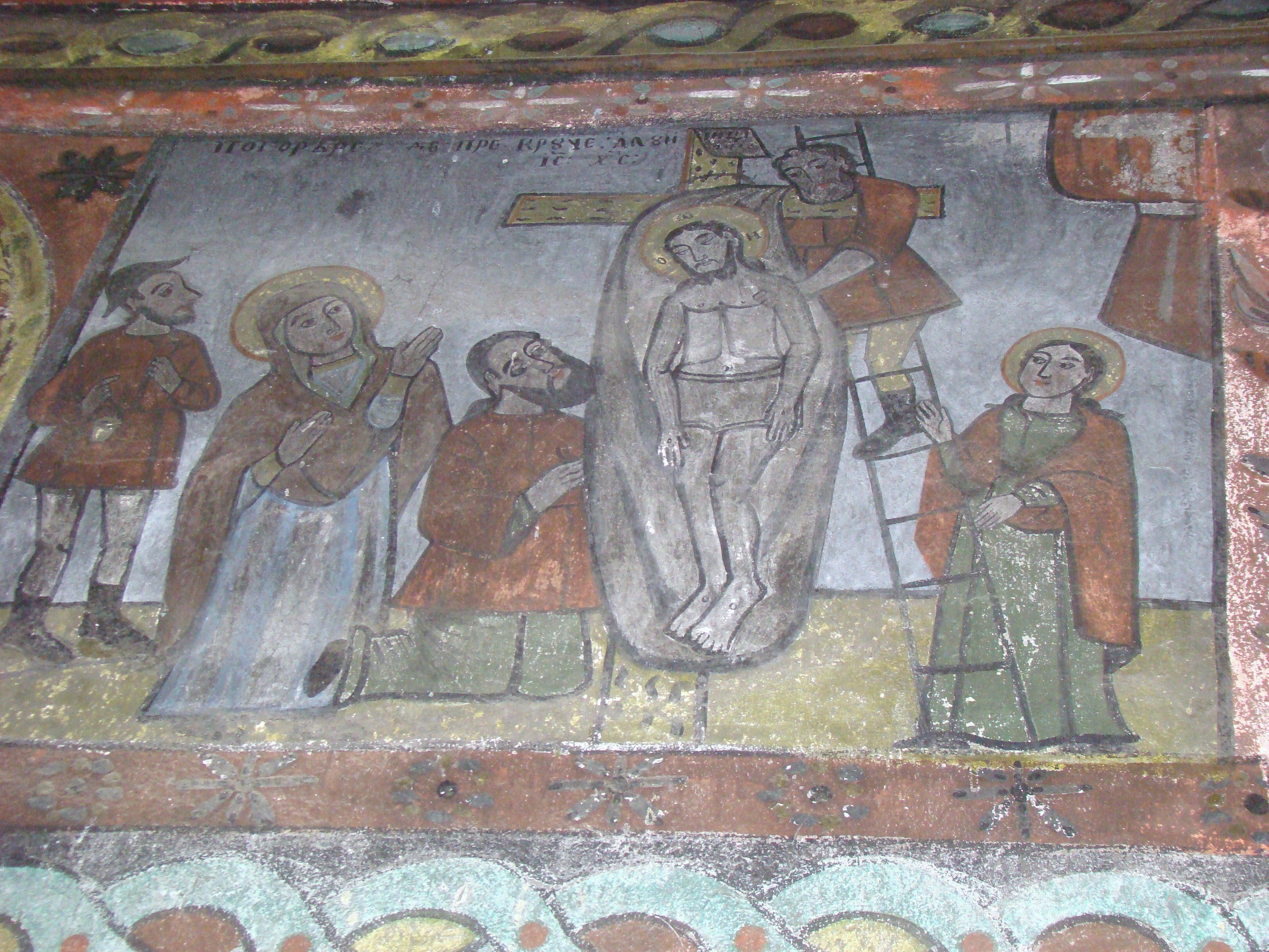 Biserica „Nașterea Maicii Domnului” din Homorog, județul Bihor